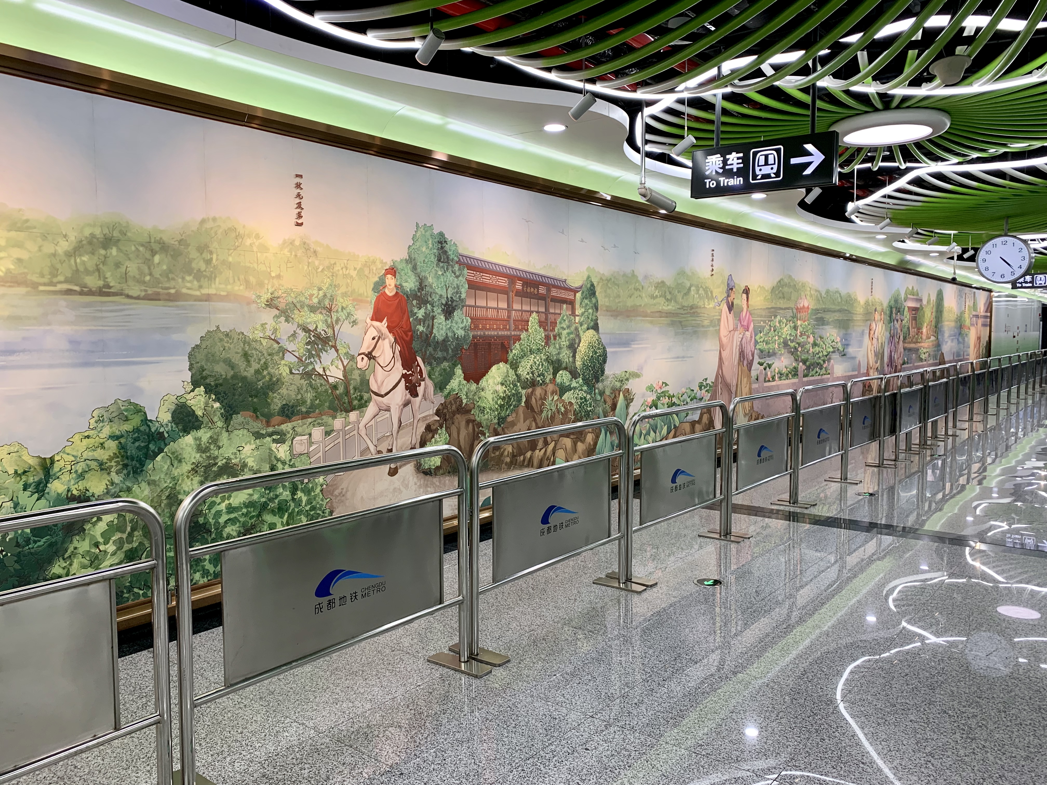 成都地铁钟楼站